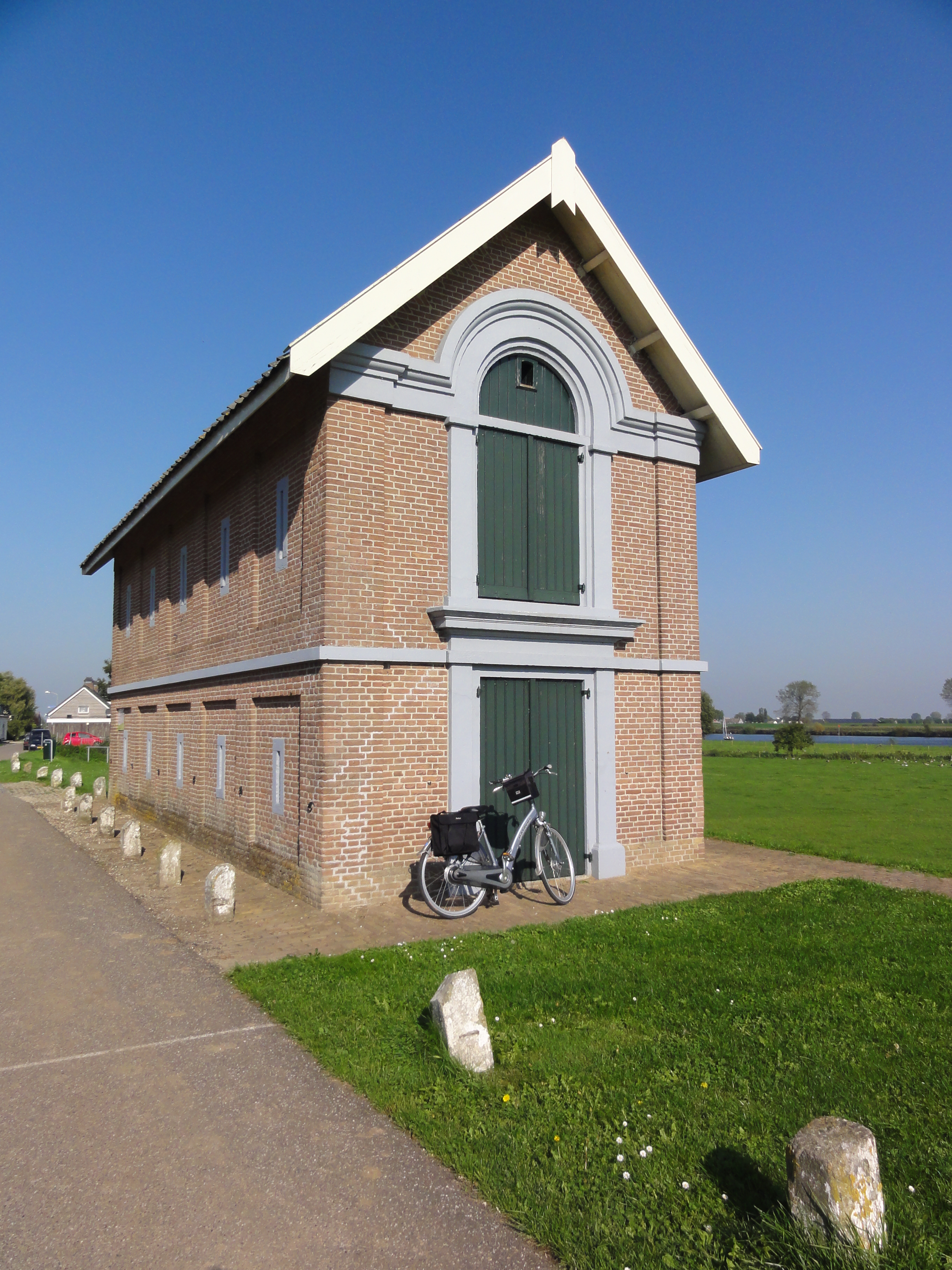 Alphen (Gld) Rijksmonument 523079 Dijkmagazijn 71″ N, 5° 28′ 28.05″ E